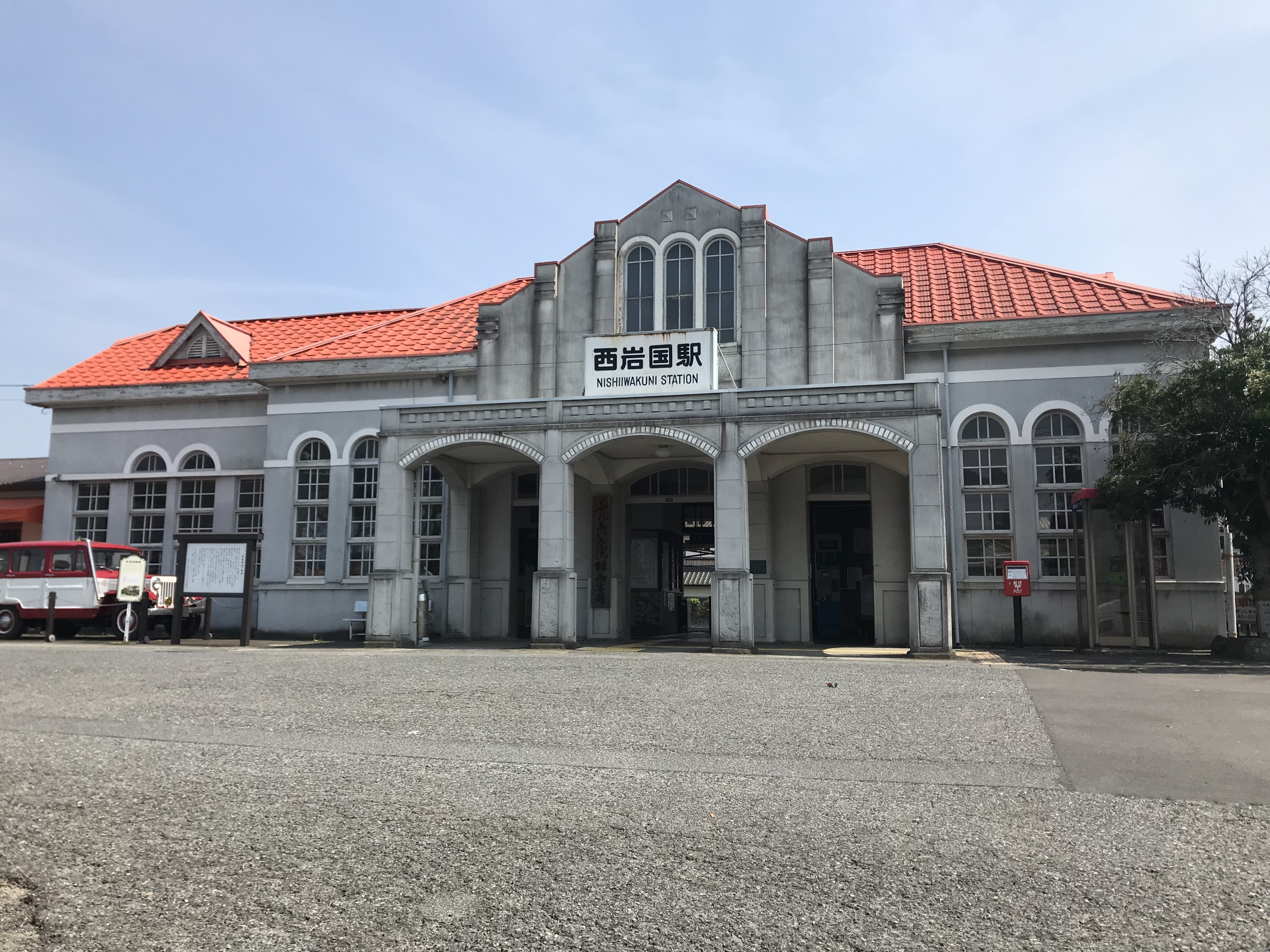 西岩国駅の駅舎